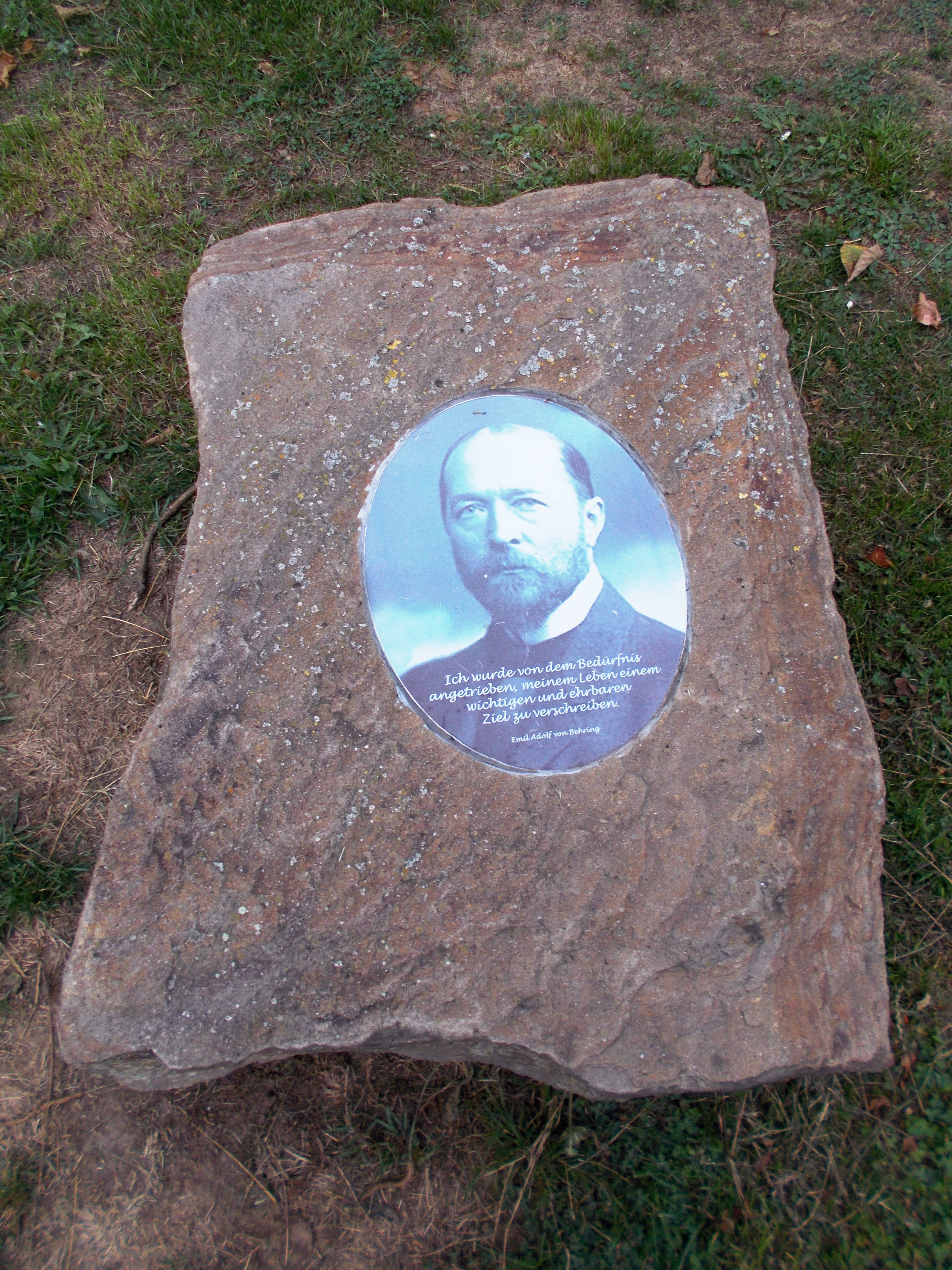 Zu Ehren Emil von Behring gestaltete 2013 die Mülheimer Künstlergruppe "AnDer" e. V. den Von-Behring-Platz. Skulptur "Ruhm und Ehre" von Heiner Schmitz.